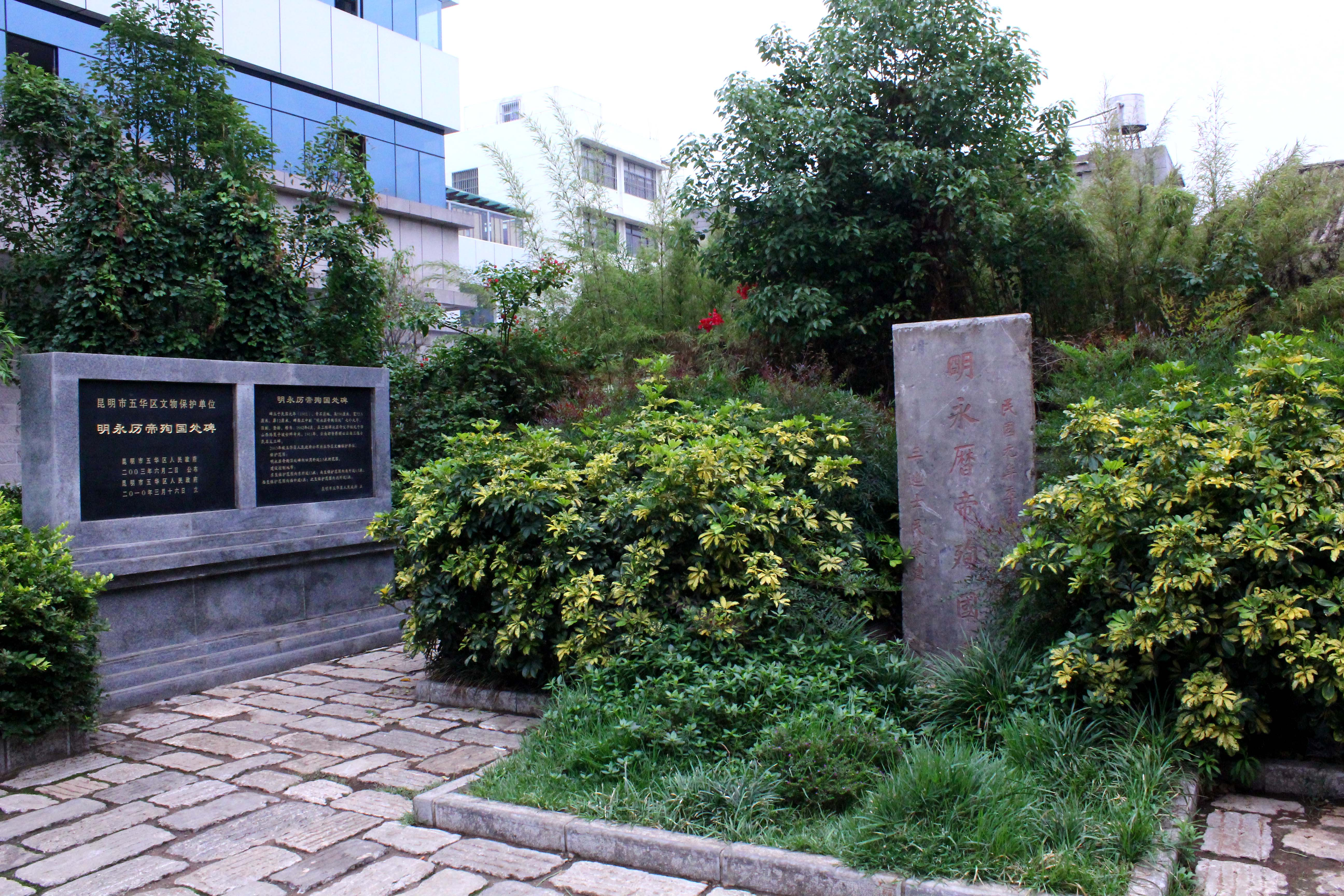 明永历帝殉国处碑，位于今天云南省昆明市五华区华山西路中段西侧，昆明市五华区翠湖社区居民委员会和昆明市妇幼保健院之间。原来位于华山西路东侧154号门前，1999年前后拓宽街道时移至今址。